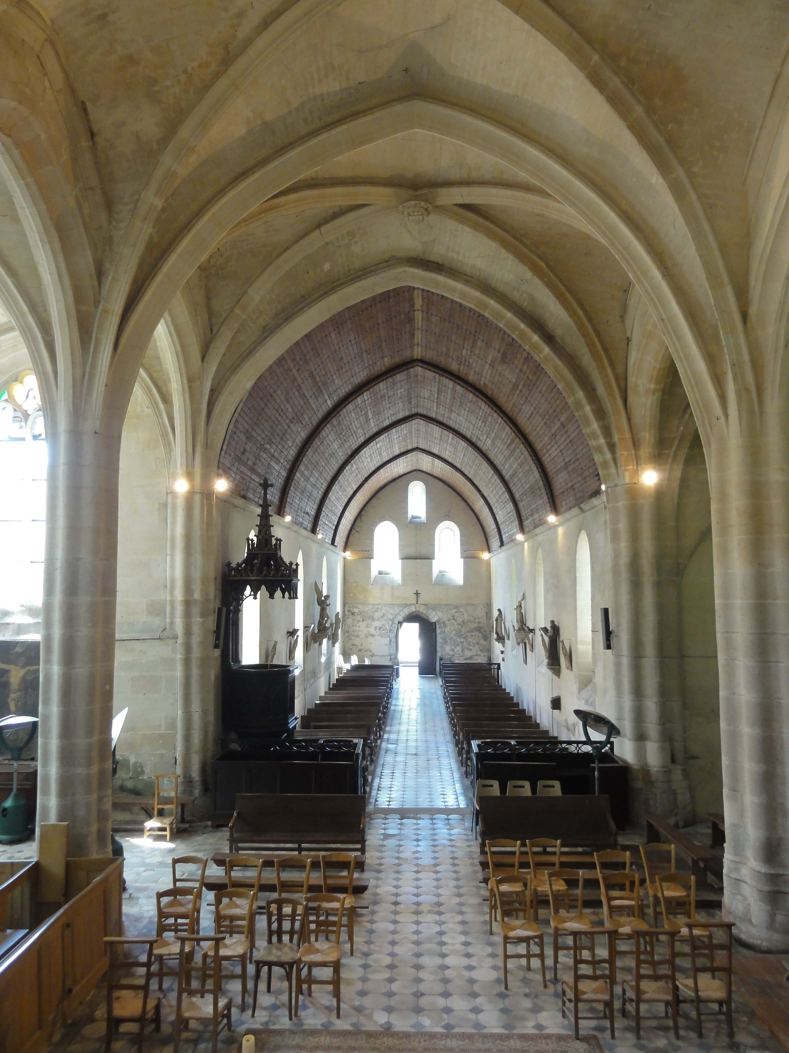 Intérieur de l'église (voir titre).